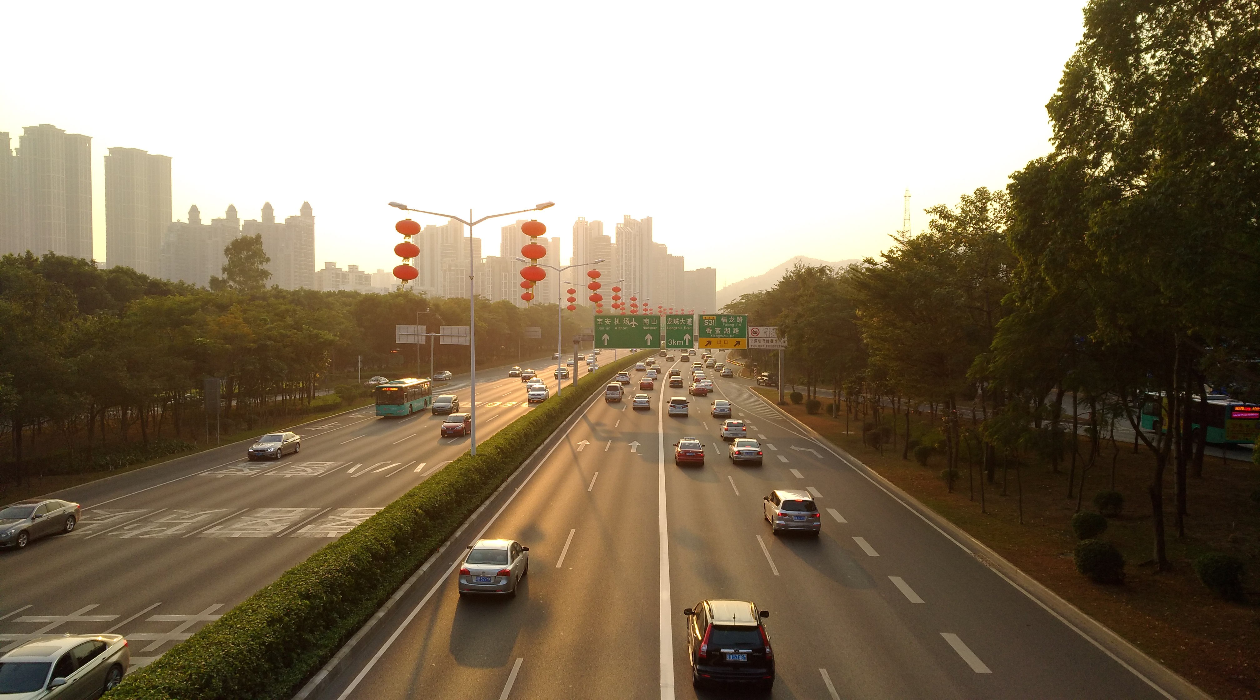 深圳道路 北环大道（107国道）福田香梅北段 摄于北环香梅北人行天桥